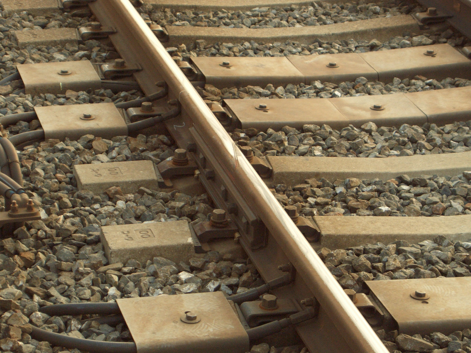 斜め接着絶縁継目 阪急電鉄京都本線大山崎駅